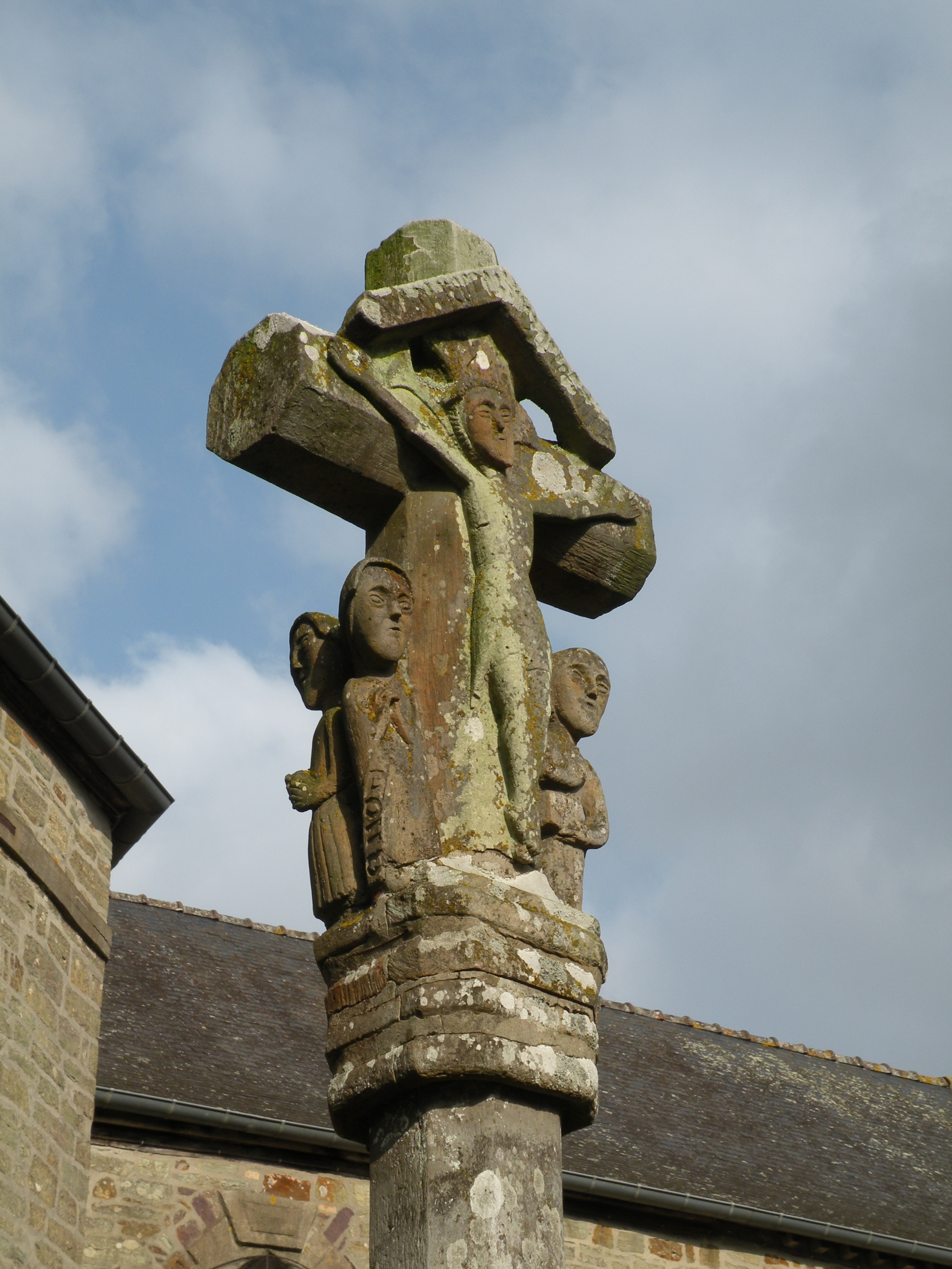 Face sud de la croix de cimetière du XVIe siècle de Lieuron.